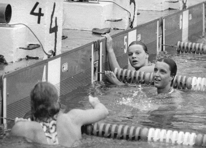 Barbara Krause, Petra Thümer, Petra Priemer ADN-ZB Gahlbeck 6.7.77 ma-Leipzig: 28. DDR-Meisterschaften im Sportschwimme-1. Tag- Mit der persönlichen Bestzeit von 55,86 s wurde Barbara Krause (SC Dynamo Berlin-M.) neue DDR-Meisterin über 100 m Freistil der Damen. Vorn Petra Thümer (SC Karl-Marx-Stadt), hinten Petra Priemer (SC DHfK Leipzig-Silbermedaille).